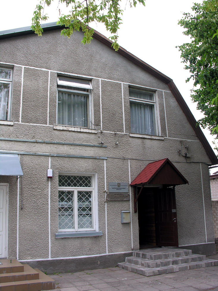 Ventos regioninio parko administracijos pastatas Viekšniuose Foto: Algirdas, 2006 m. liepos 18 d., Lietuva